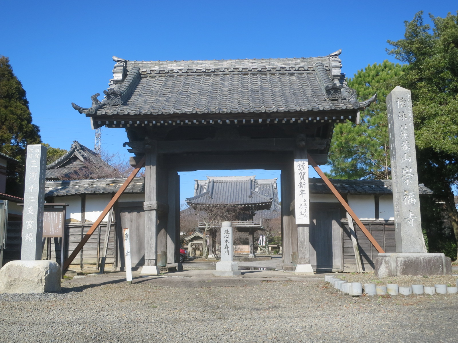 崇福寺（岡崎市中島町）